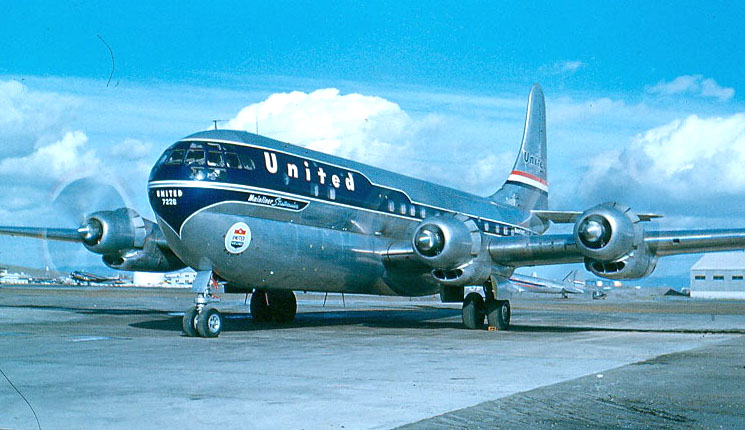 B377unitedSFO